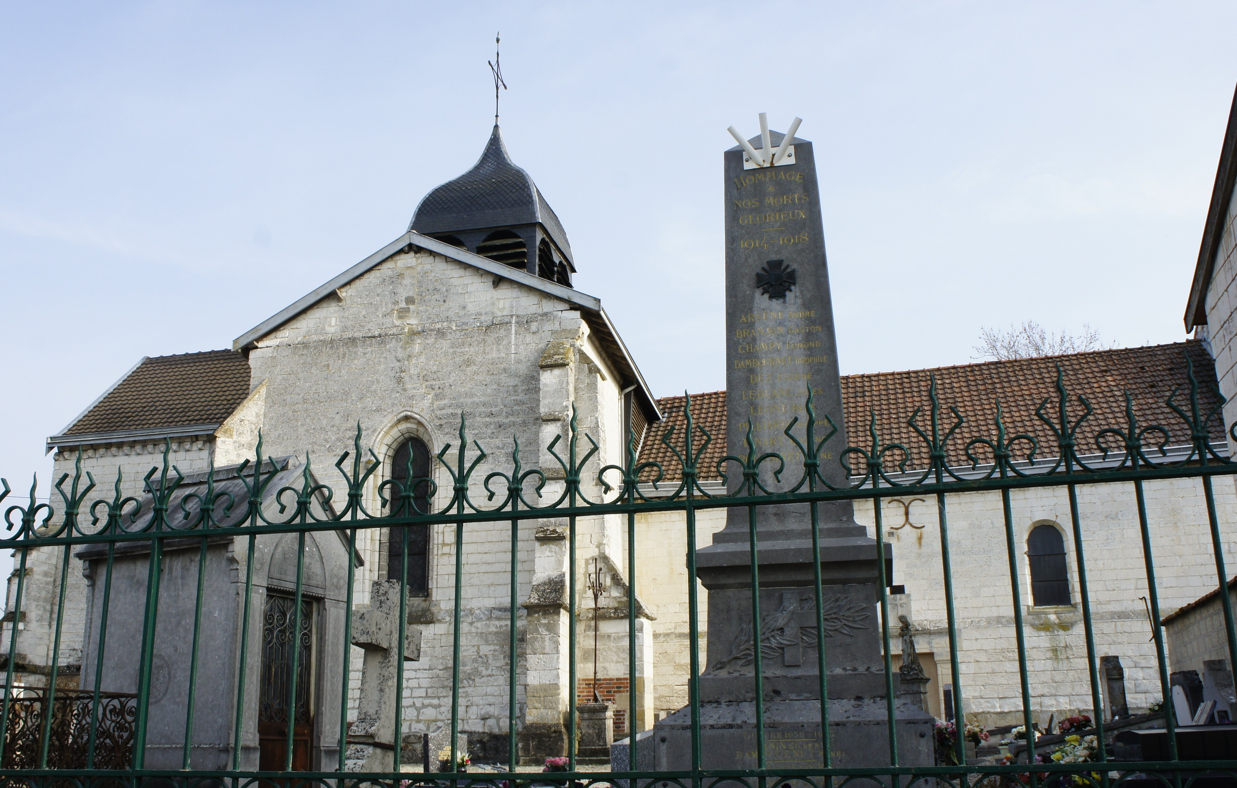 Une vue depuis la route de l'Église, du_monument_aux_morts_de Chepy.